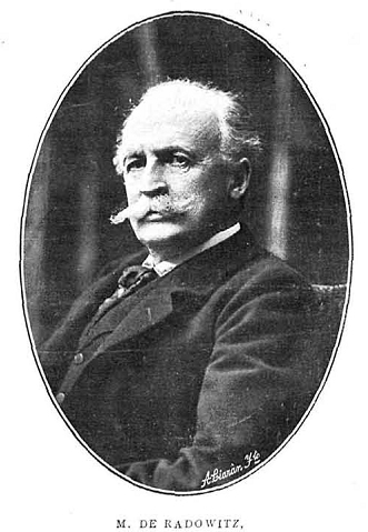 Retrato de Joseph Maria von Radowitz (antiguo embajador de Alemania en Madrid, fallecido el 13 ó 15 de enero de 1912), obra del fotógrafo Christian Franzen, recogido en la revista española La Ilustración Española y Americana.